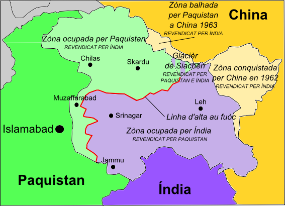 Division de Cachemire après 1963.